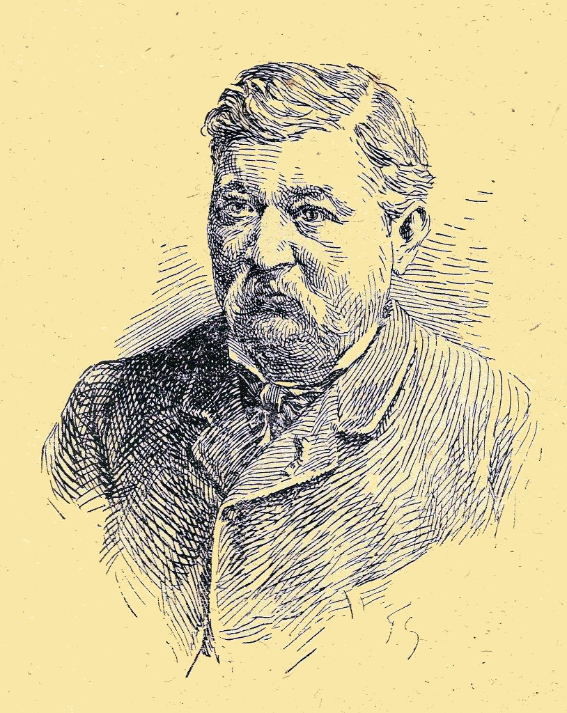 Portrait (dessin compressé) du vétérinaire Hippolyte Rossignol (1837-1919)